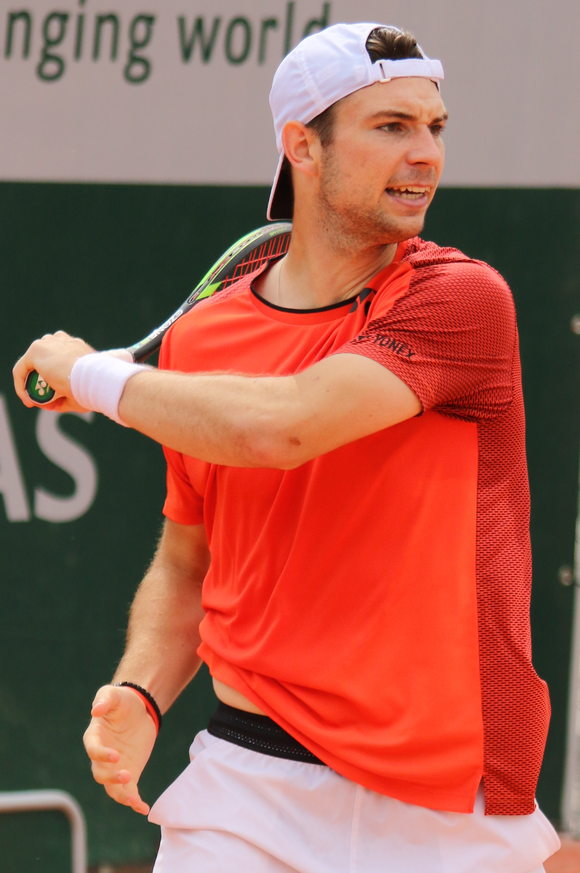 Rodionov RGQ19 (28)